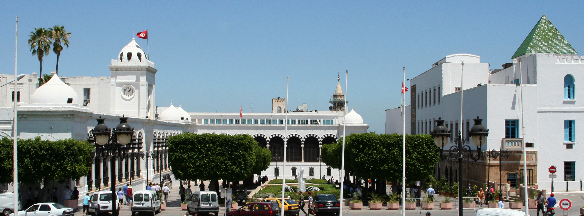 La kasbah (en face du siège de la municipalité) - Tunis (Tunisie)